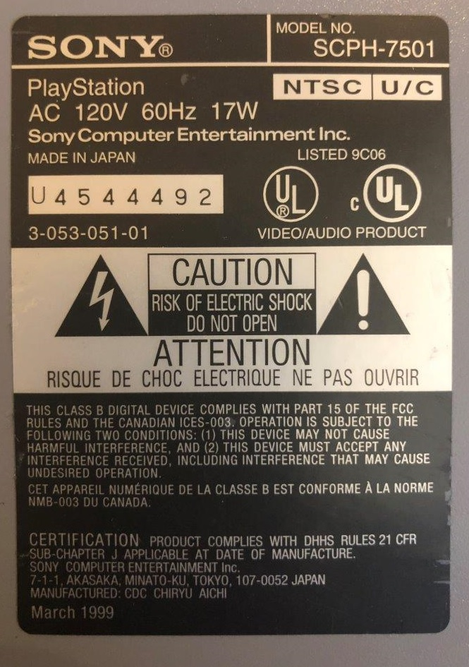 PlayStation 北米地域用 NTSC U/C型の裏面